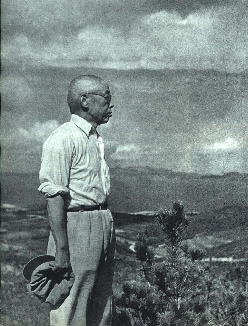 1964-01 1964年 田汉